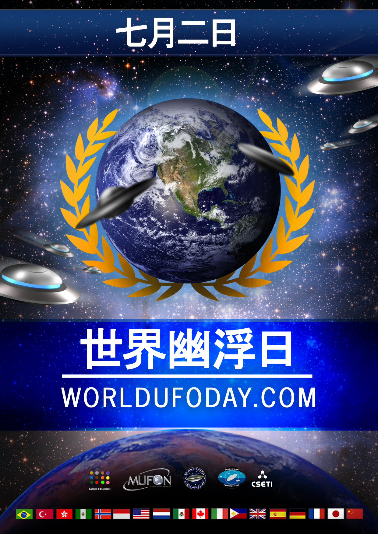 World UFO Day China